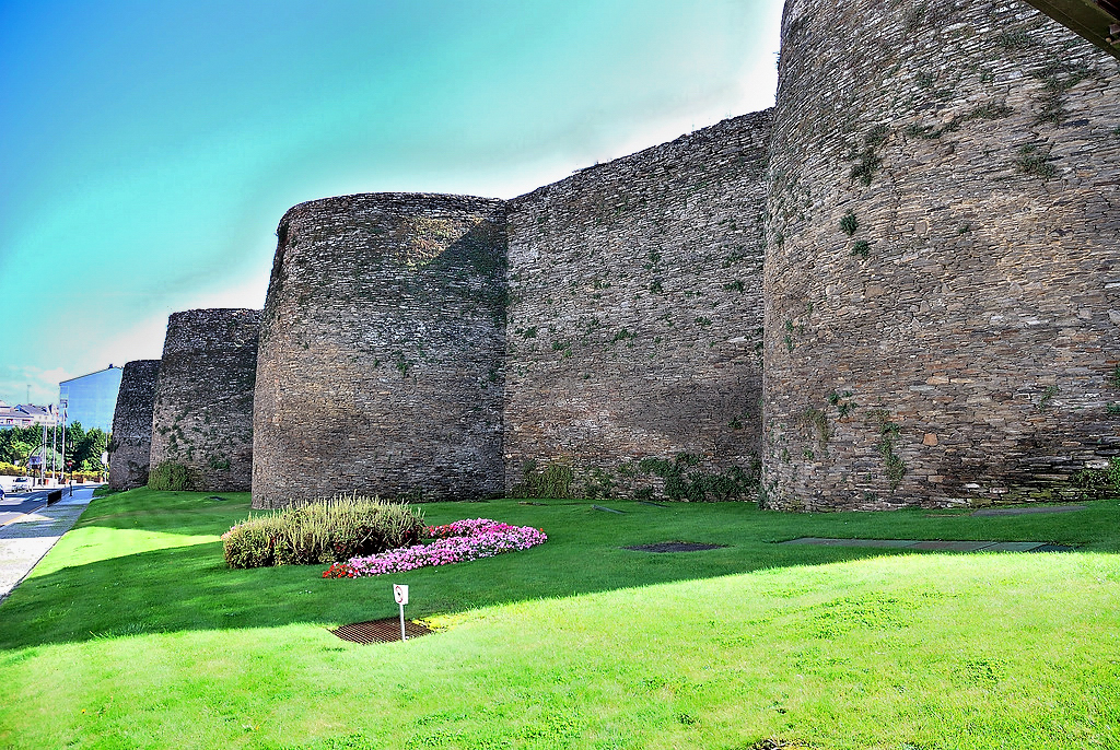 vue sur le rempart romain